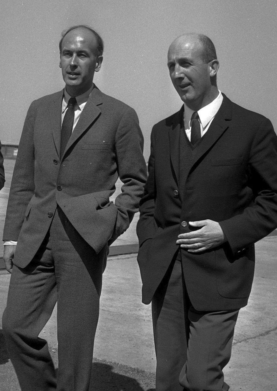 Aéroport de Toulouse-Blagnac. Le 20 Mai 1969. Vue de Valéry Giscard d'Estaing, d'André Turcat et d'un troisième homme sur le tarmac de l'aéroport de Toulouse-Blagnac.